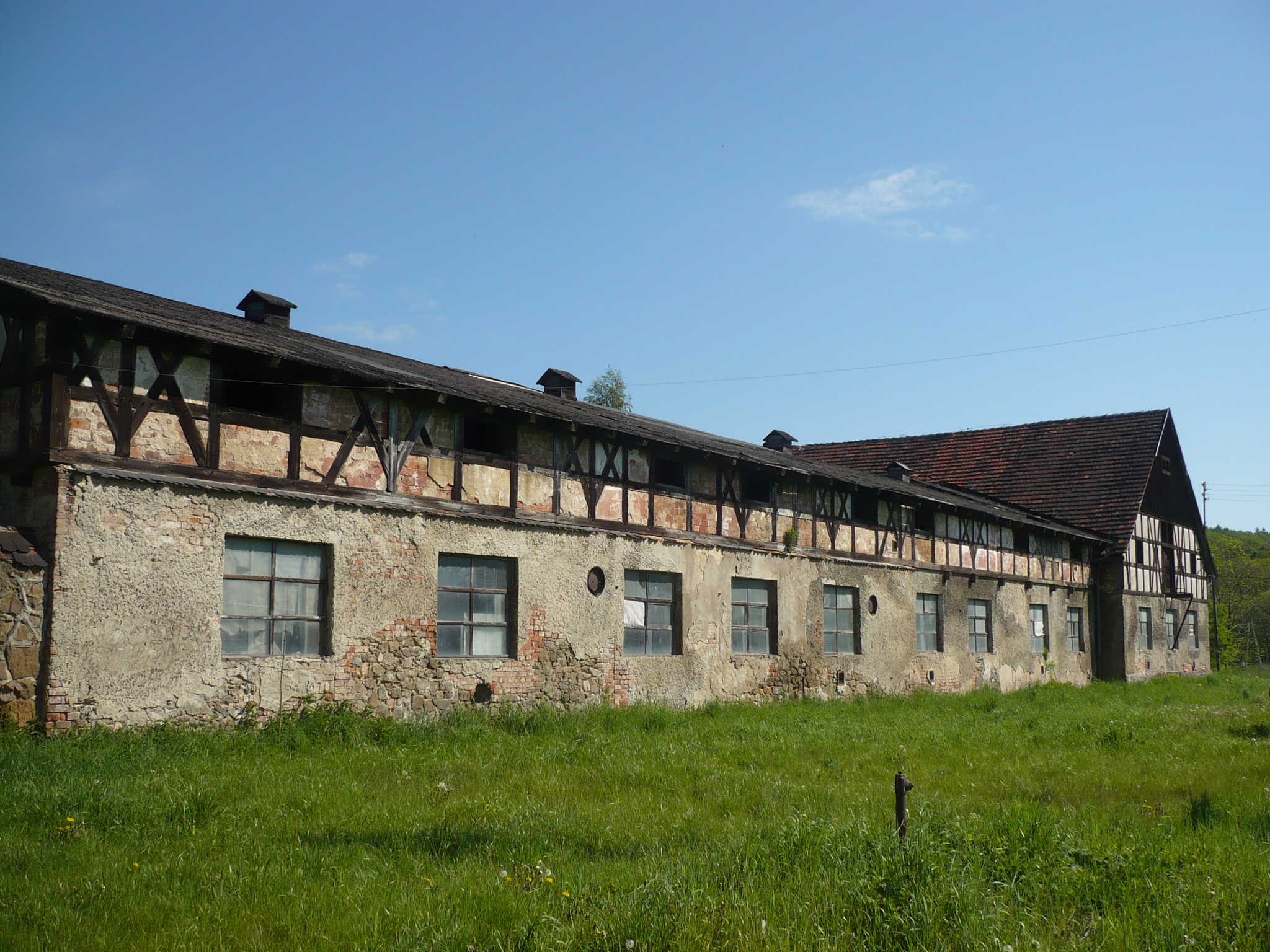 Lubiechów